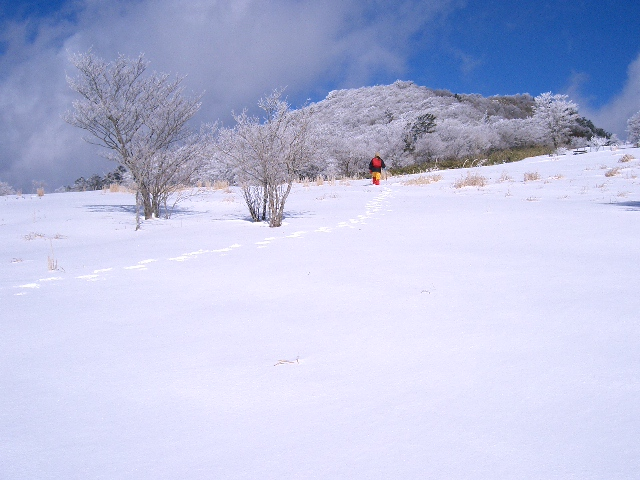 自由の広場から茶臼山